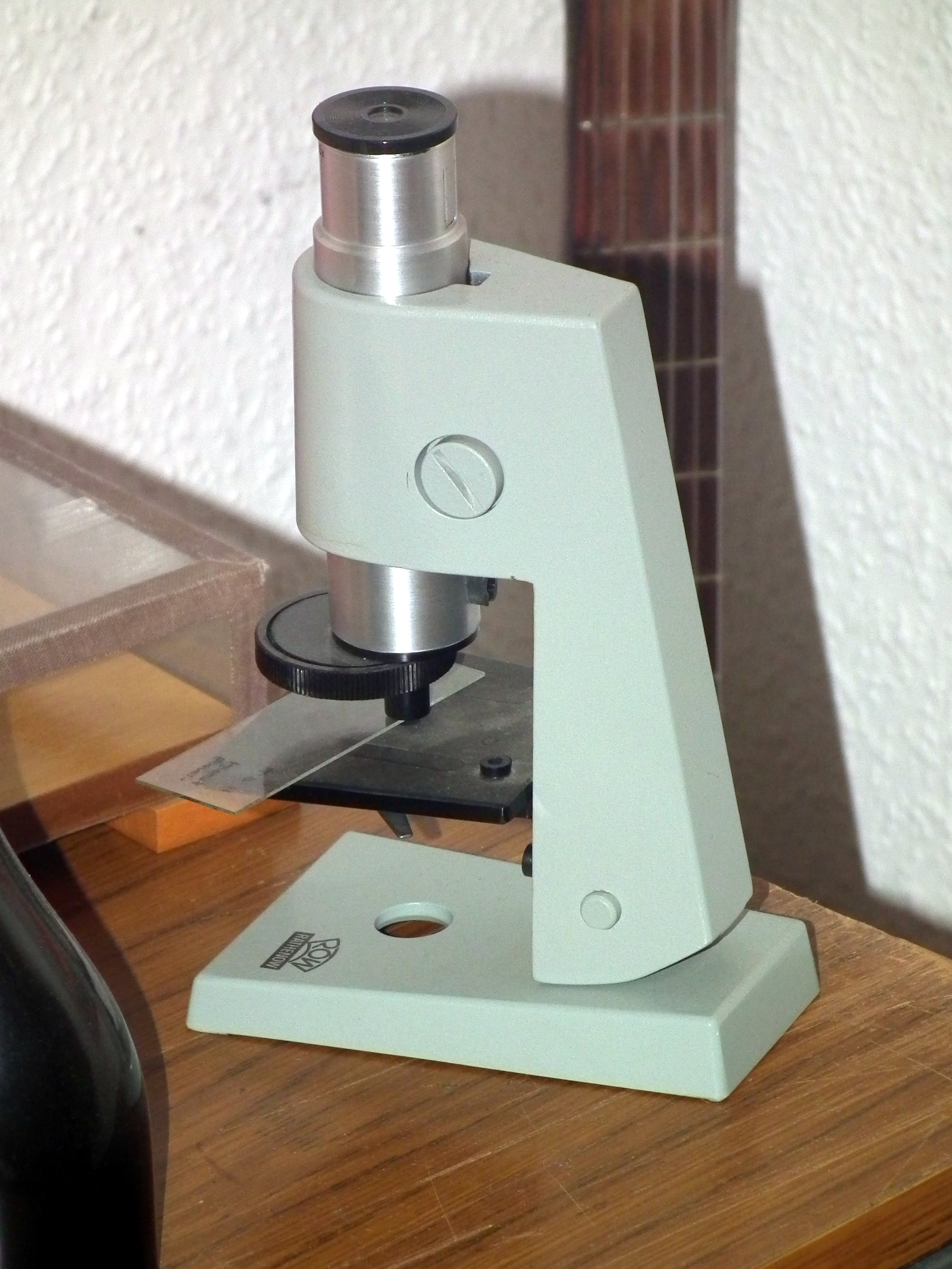 DDR-Museum Pirna, Schulmikroskop von Rathenower Optische Werke, Veröffentlicht mit Genehmigung der Museumsleitung